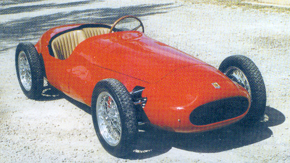 Bandini 750 sport siluro